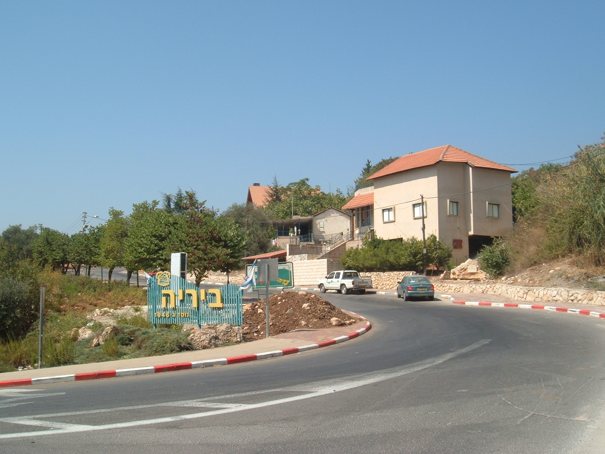 Moshav Birya. מושב ביריה